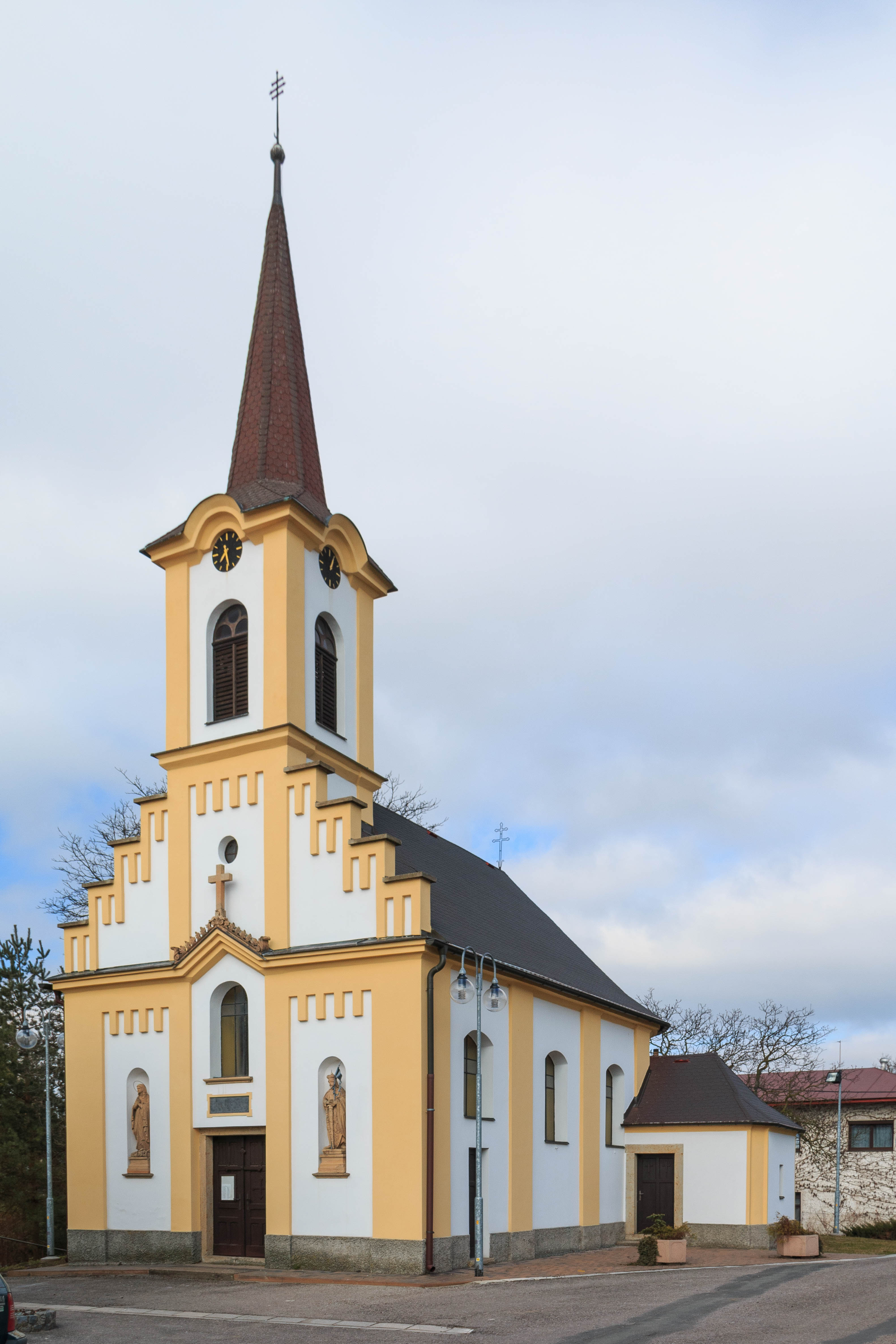 Nahořany kostel Svaté rodiny